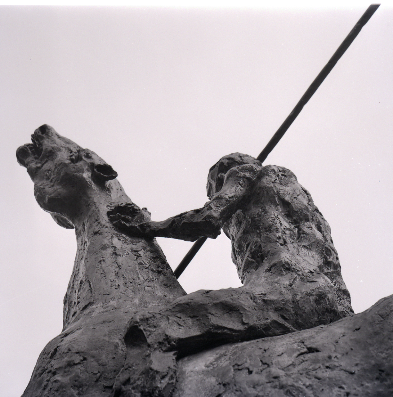 Servizio fotografico : Milano, 1959 / Paolo Monti. - Buste: 12, Fototipi: 12 : Negativo b/n, gelatina bromuro d'argento/ pellicola ; 6x6. - ((Serie costituita da 12 buste di carta, tenute insieme da graffetta, identificate con i nn.: R14660, R14661, R14662, R14663, R14664, R148665, R14666, R14667, R14668, R14669, R14670, R14671. - Sulla busta R14660: "Fabbri, Caccia al cinghiale". - Fonte: Quaderno di Paolo Monti: s.t. [Soggetti e committenti] (1956-1961), presso Archivio Paolo Monti